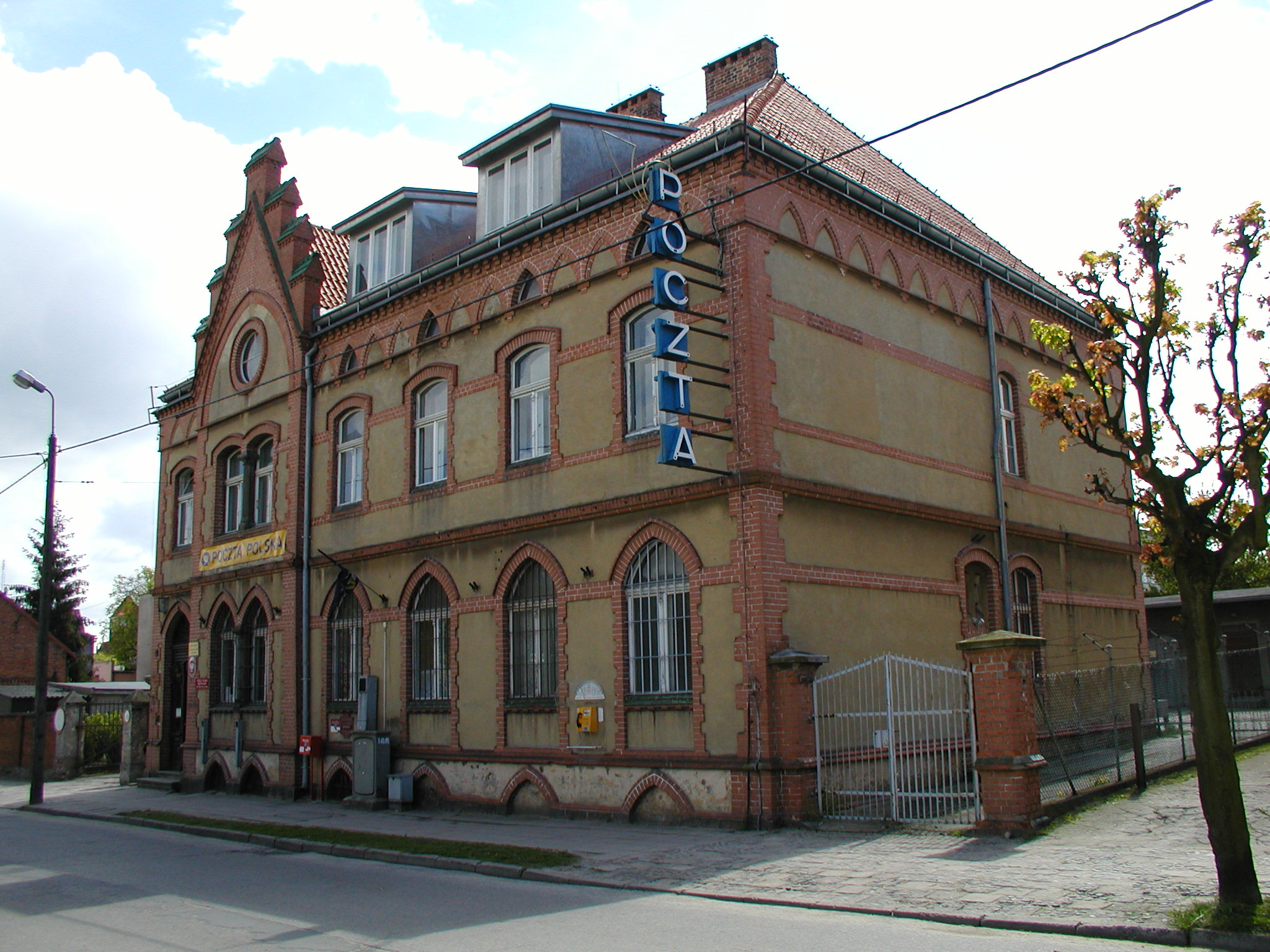 budynek poczty Nowe Miasto Lubawskie, ul. Działyńskich 1, Nowe Miasto Lubawskie (gmina miejska)